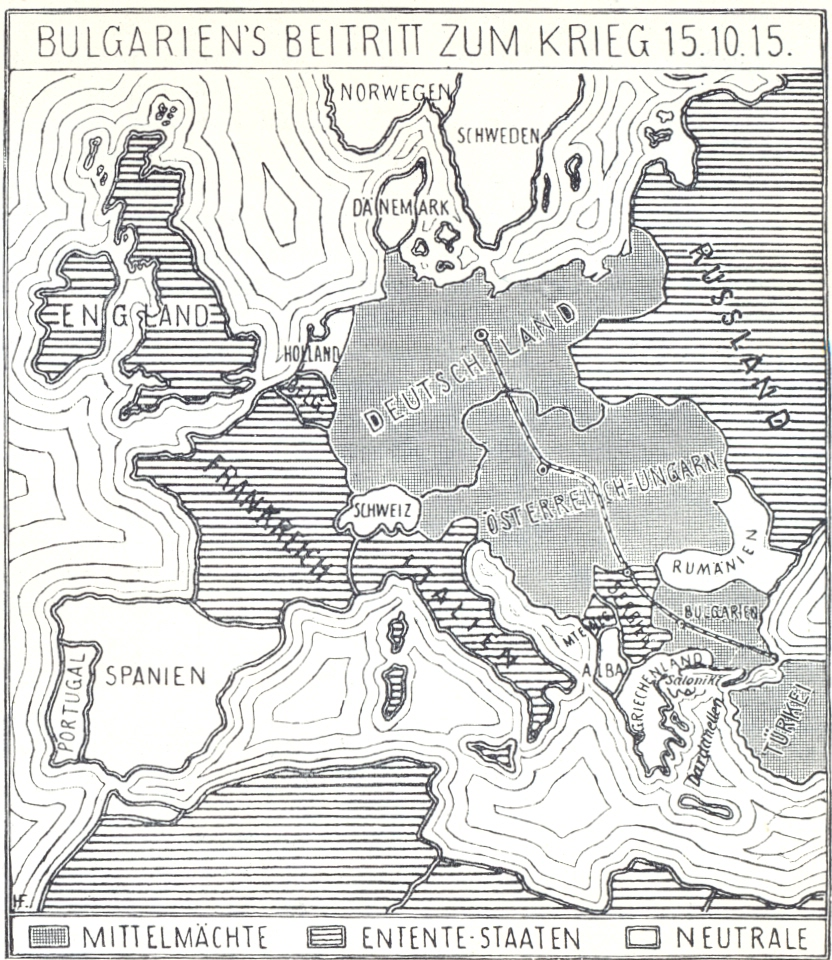 Karte Seite 38: Bulgariens Beitritt zum Kreg 1915